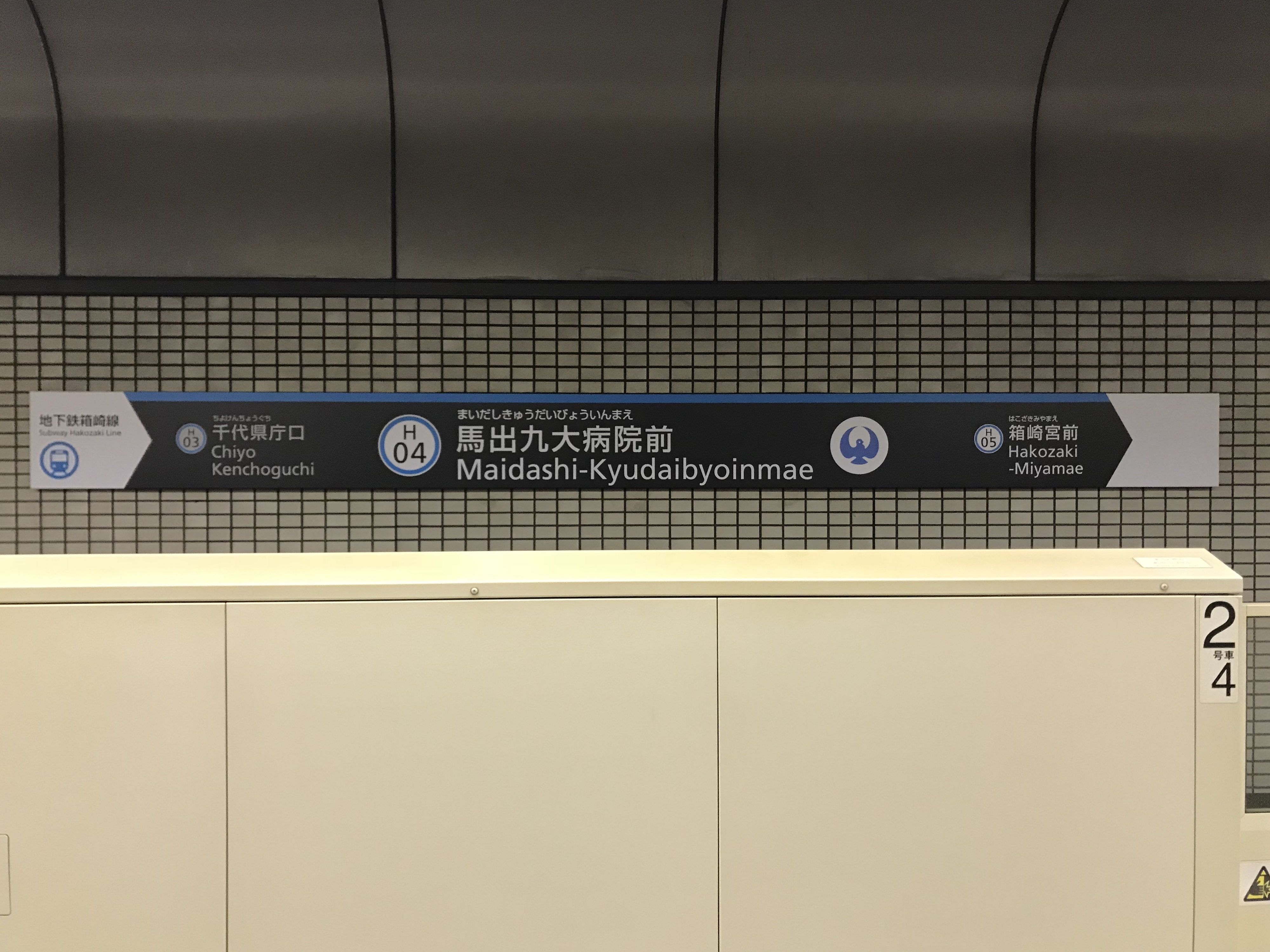 馬出九大病院前駅の駅名標。イラストは病院にちなんでハト